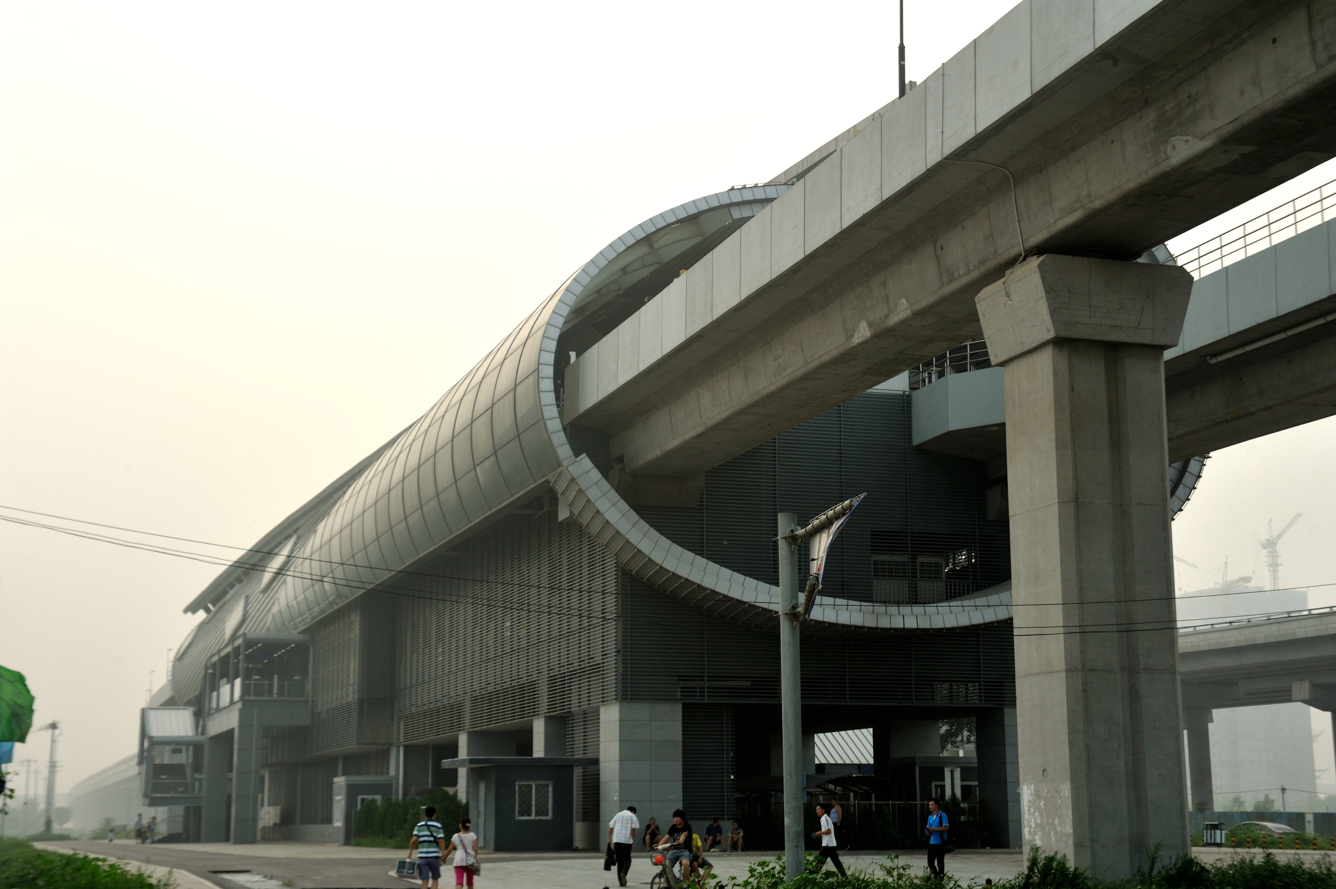 长阳站外观